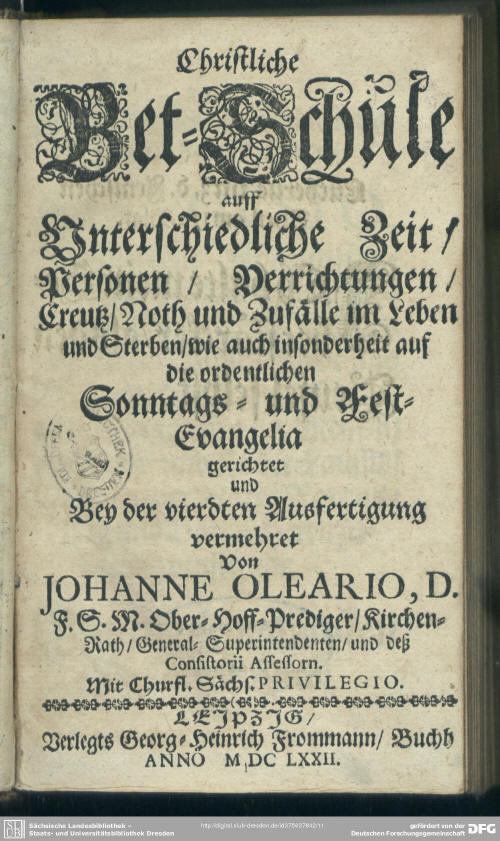 Christliche BetSchule auff unterschiedliche Zeit. Livret de prières de Johann Oelarius